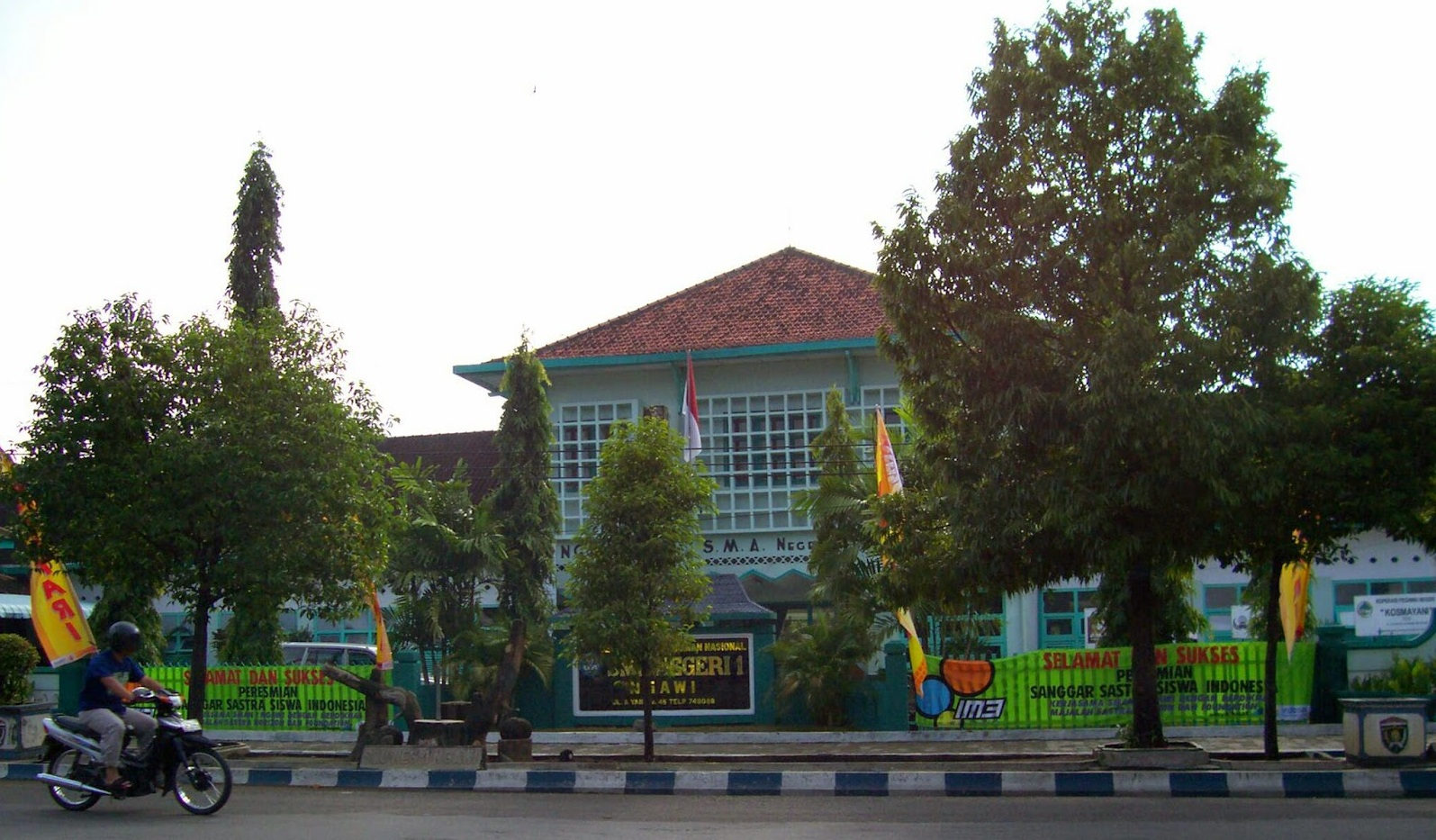 Gedung Smasa Tempo Dulu